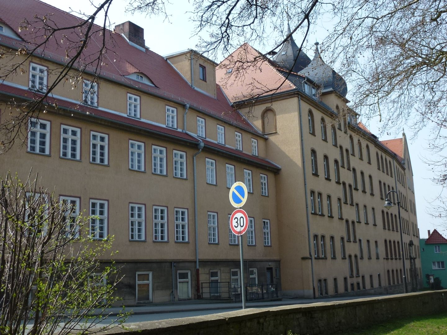 Christophorusschule in Droyßig